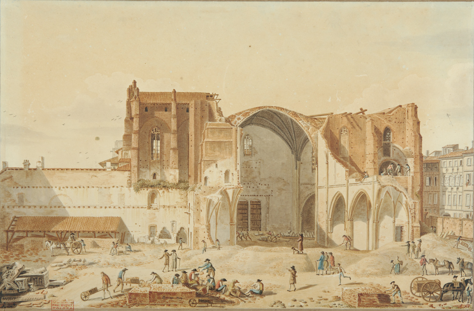 démolition du couvent des Carmes à Toulouse